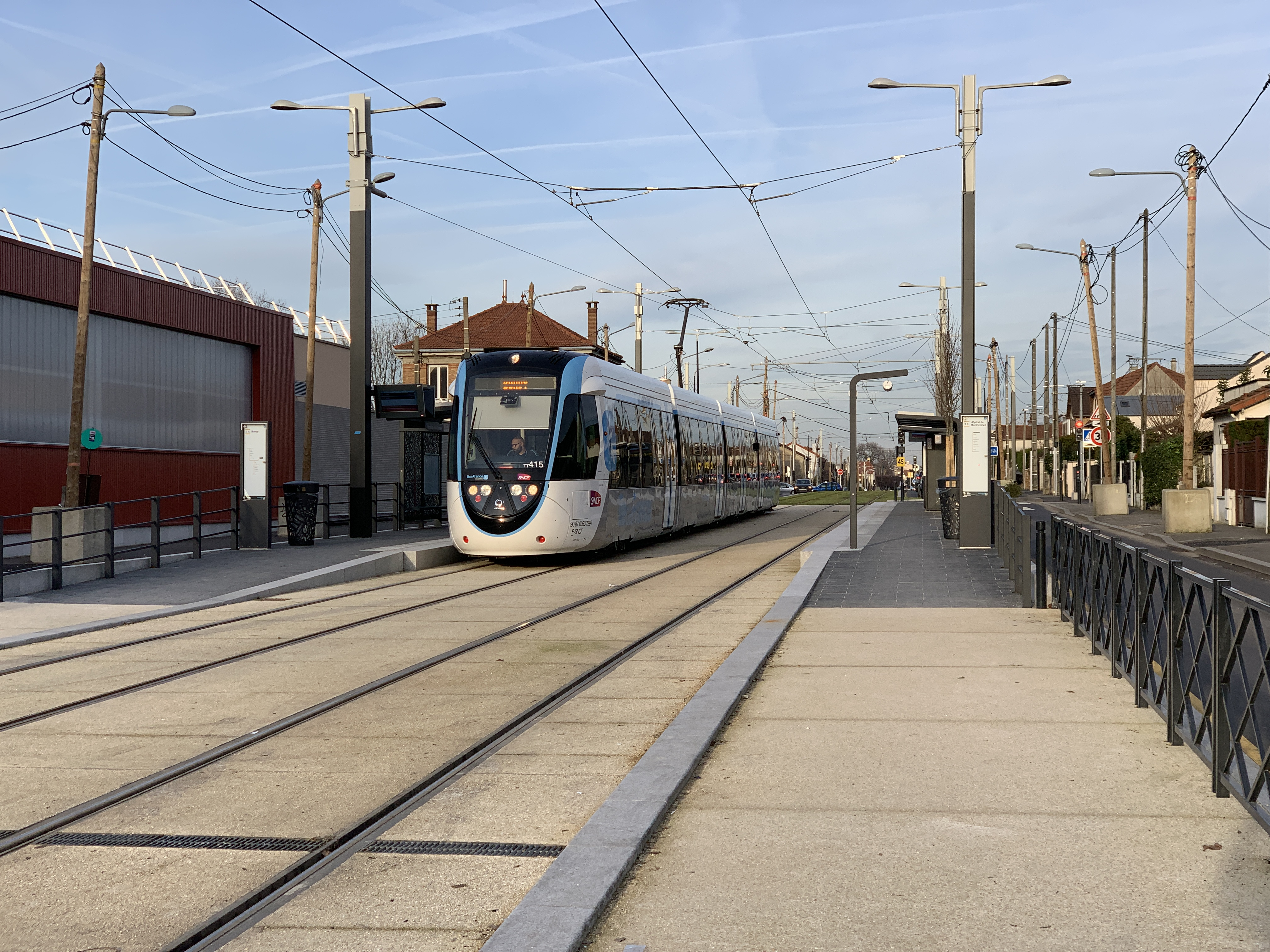 Rame SNCF Class U 53700 en arrêt à la station République - Marx Dormoy, Livry-Gargan.